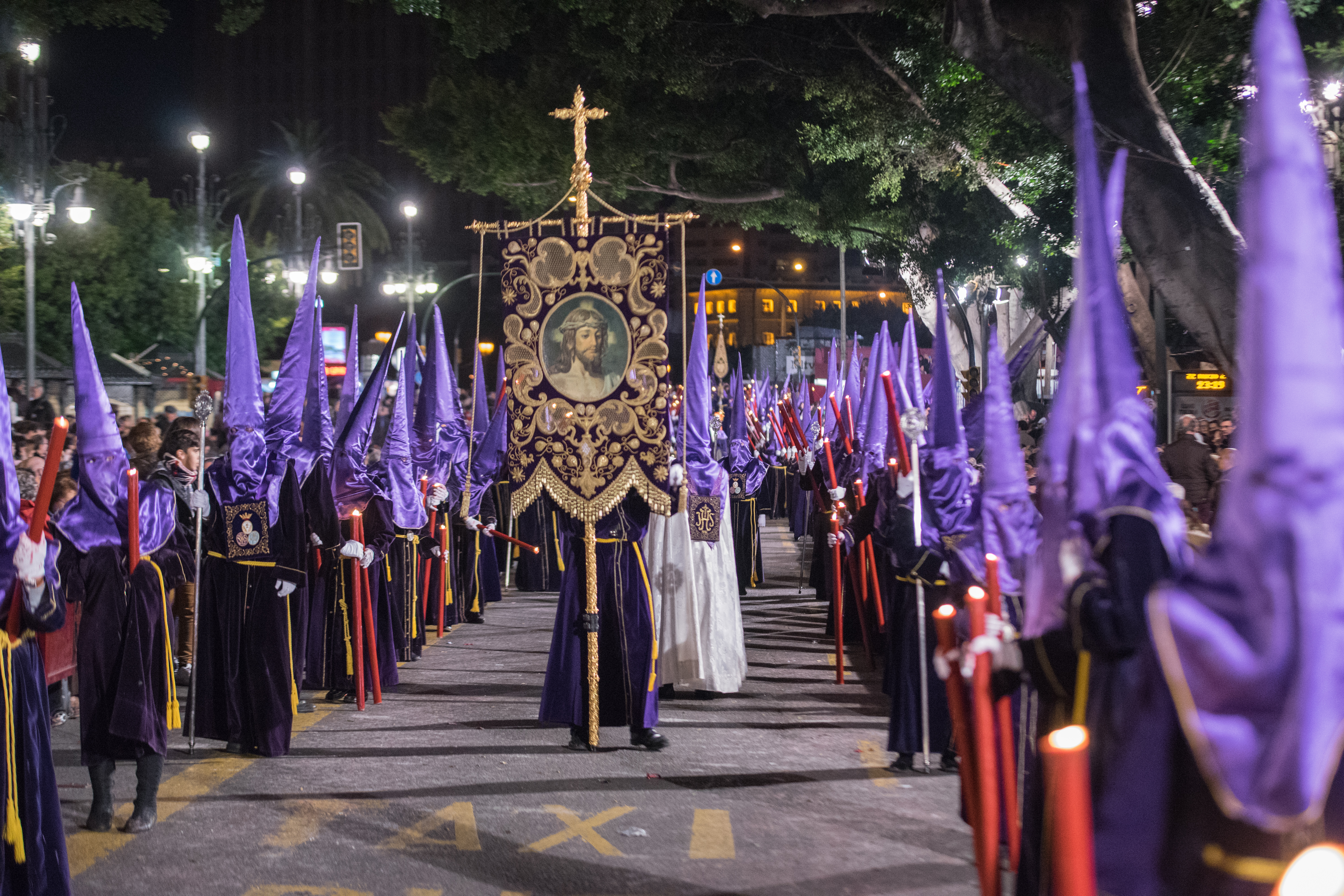 Estandarte de la Muy Ilustre, Venerable y Fervorosa, Hermandad Sacramental y Cofradía de Nazarenos de nuestro Padre Jesús de la Sentencia, María Santísima del Rosario en sus Misterios Dolorosos y San Juan Evangelista This is a photography of a Folklore festival in Spain (Wikidata id Q9075883).